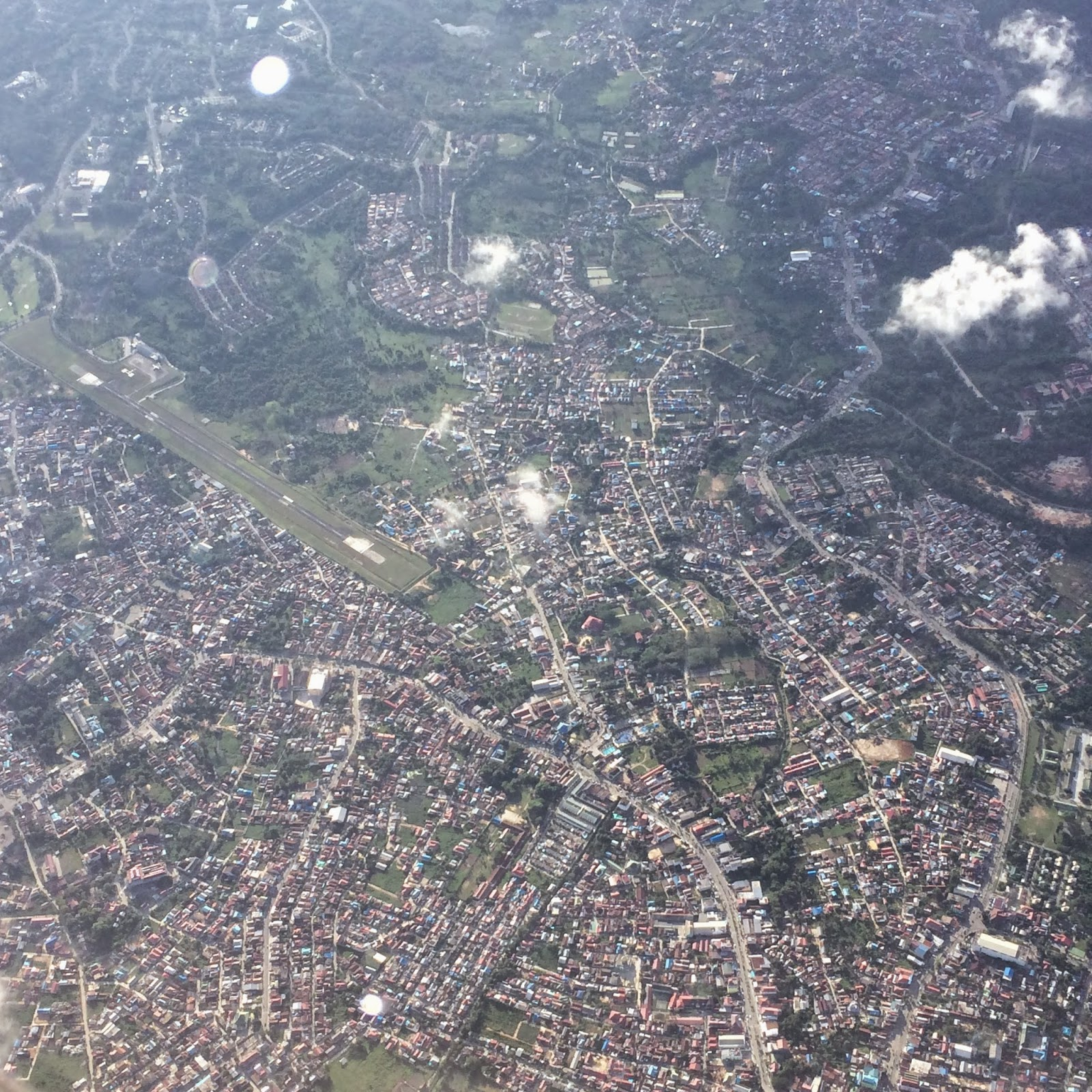 Bontang aerial